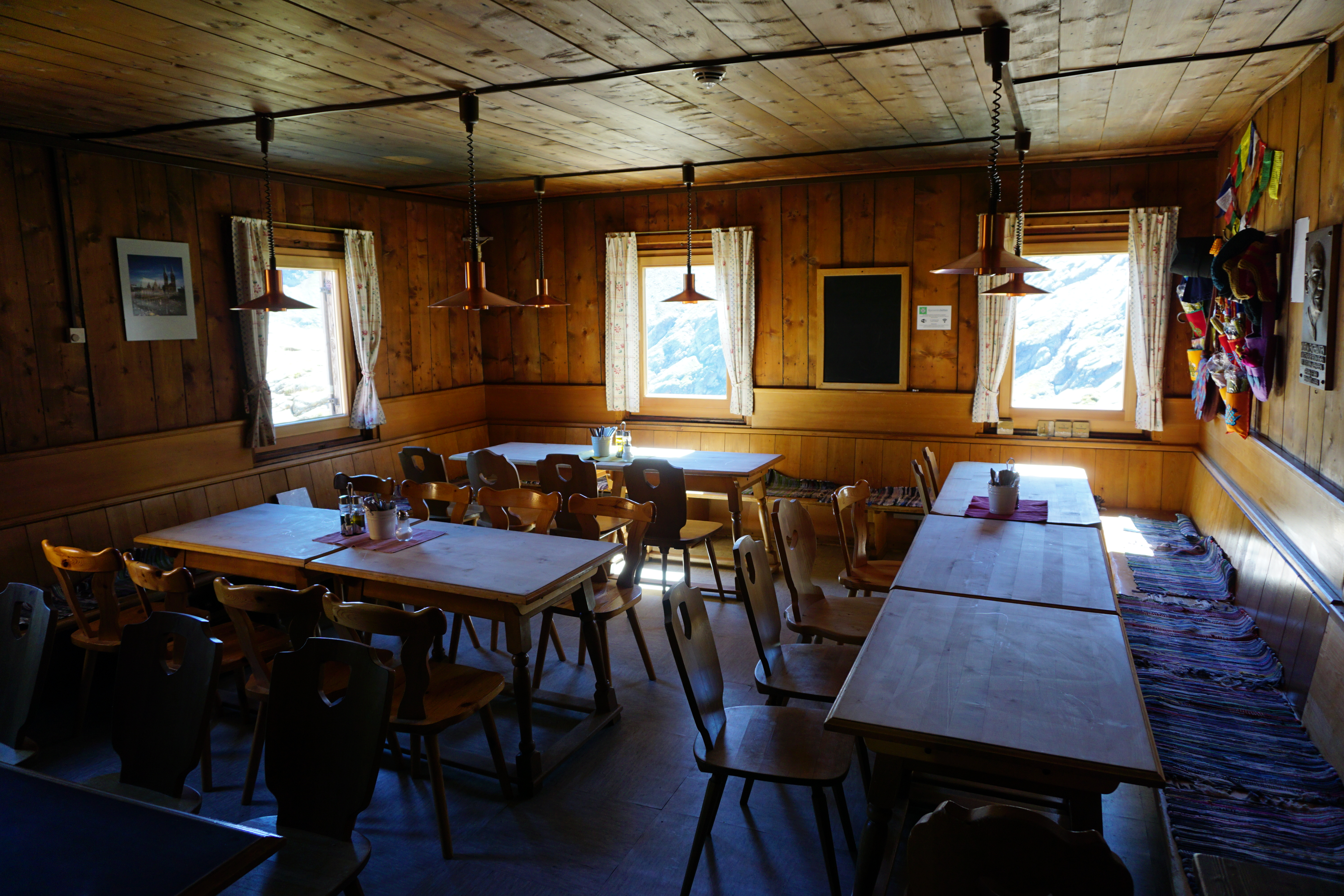 Gastraum der Bremer Hütte